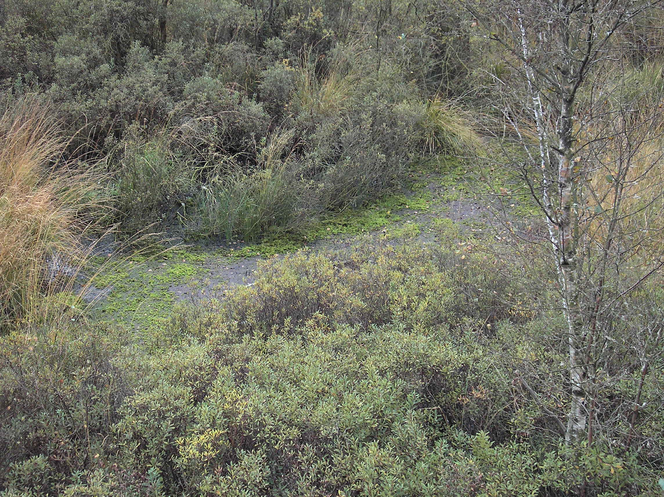 Gagelsträucher (Myrica gale) am Rand des naturnahen Hochmoors